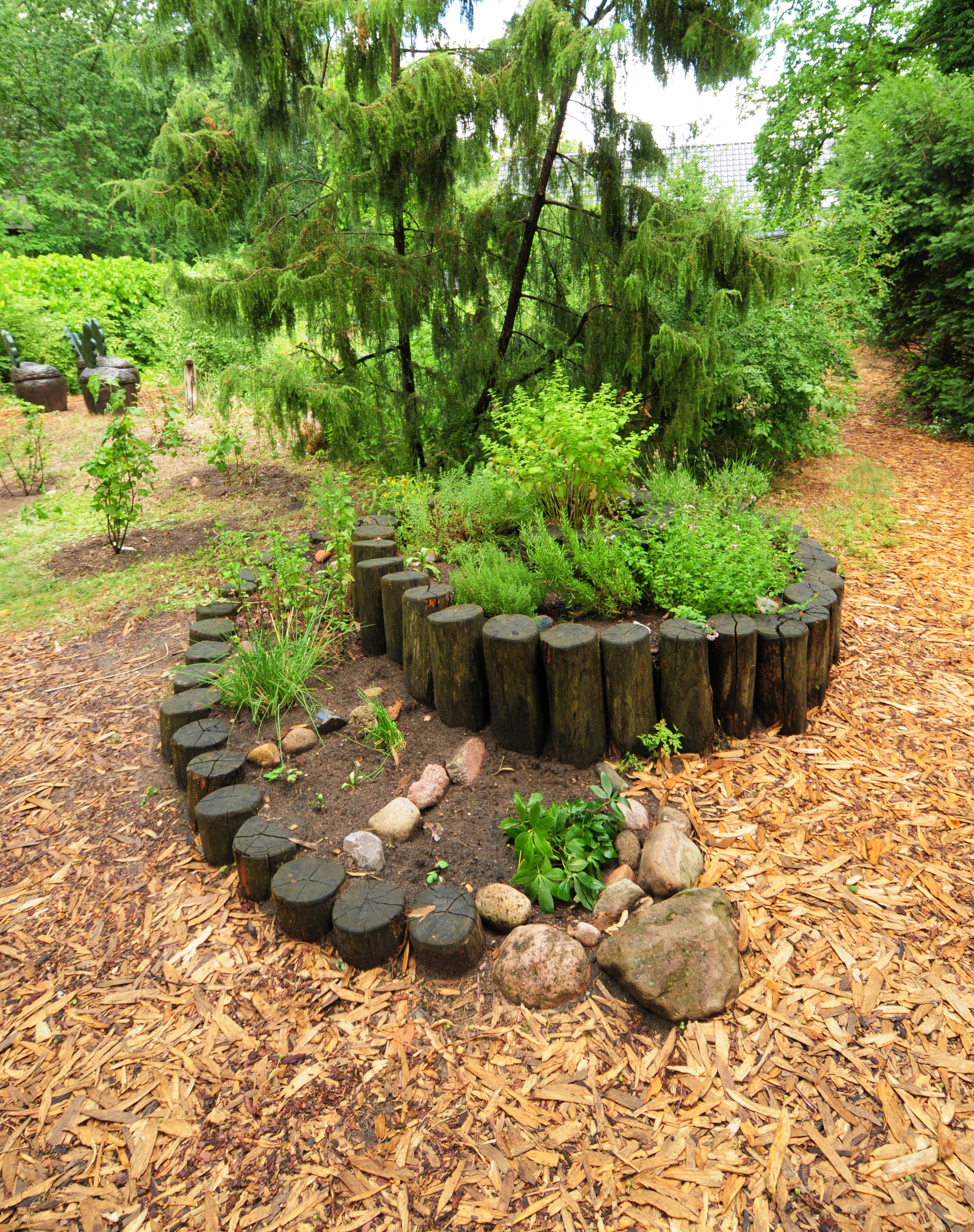 Gräbendorf: Haus des Waldes (Deutschland, Land Brandenburg)